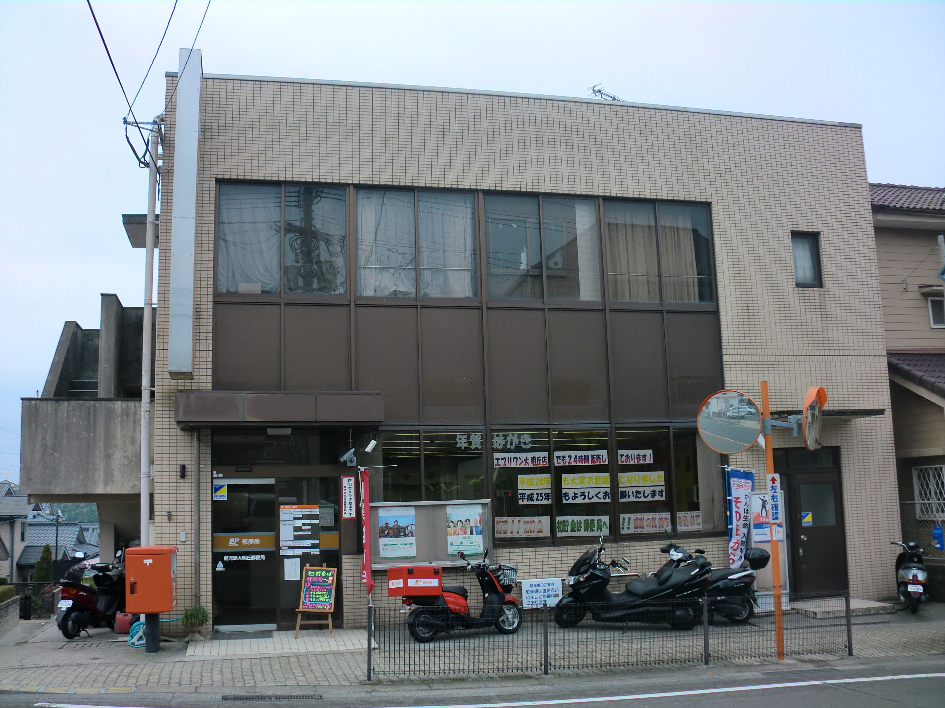 鹿児島市にある鹿児島大明丘（かごしまだいみょうがおか）郵便局